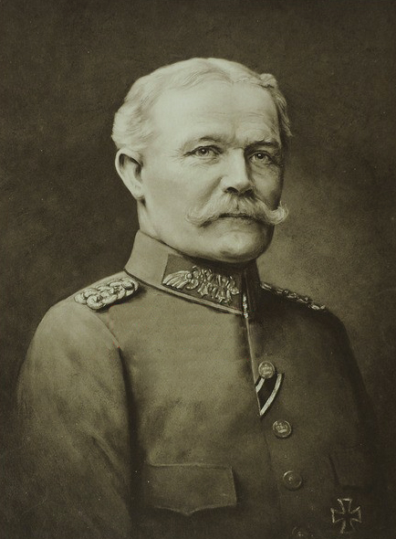 General Karl Ludwig d'Elsa (1849-1922)